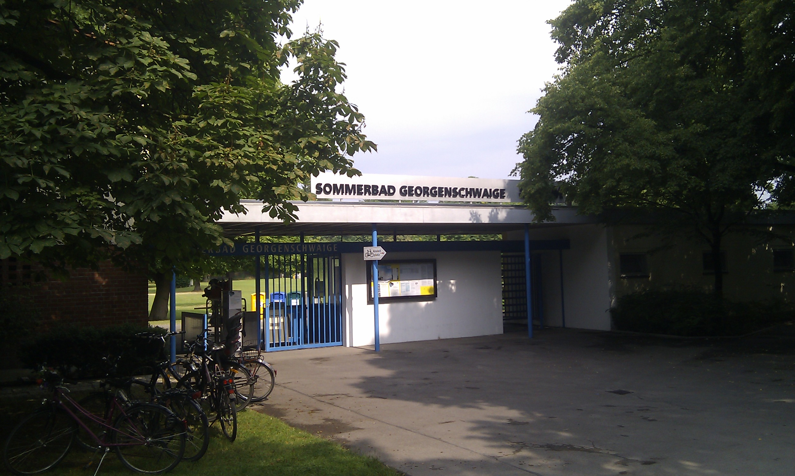 Sommerbad Georgenschwaige, Belgradstraße, München